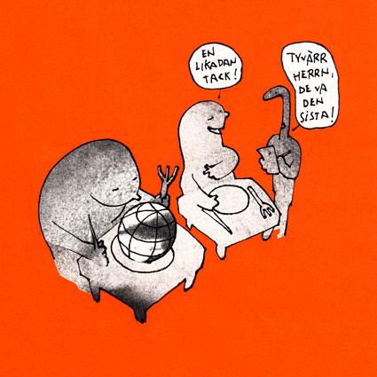 Restaurangscen tecknad av Ulf Frödin, gjord till Diakonias tidning Dela Med 2008.